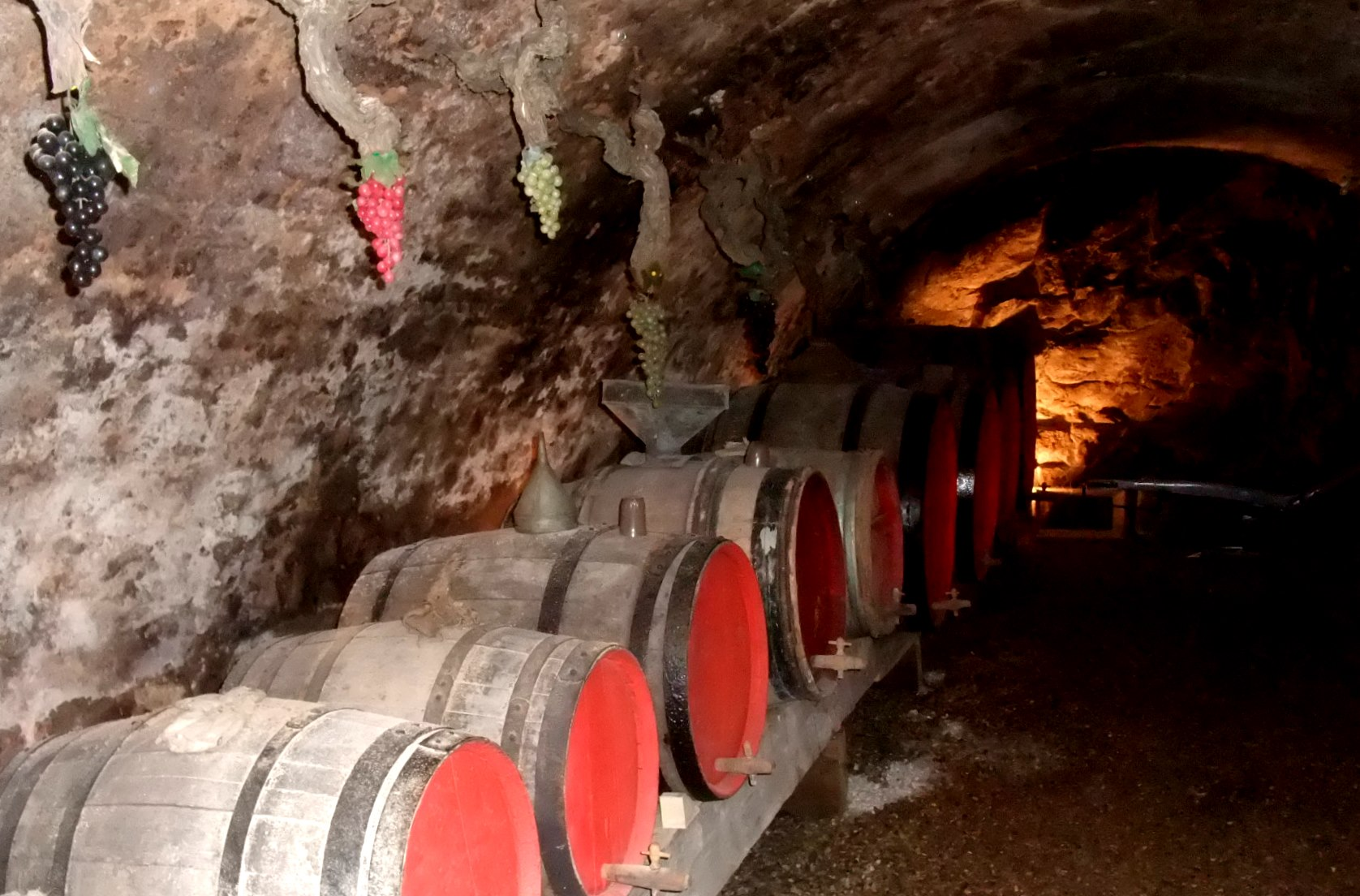 Boulieu cave à vin